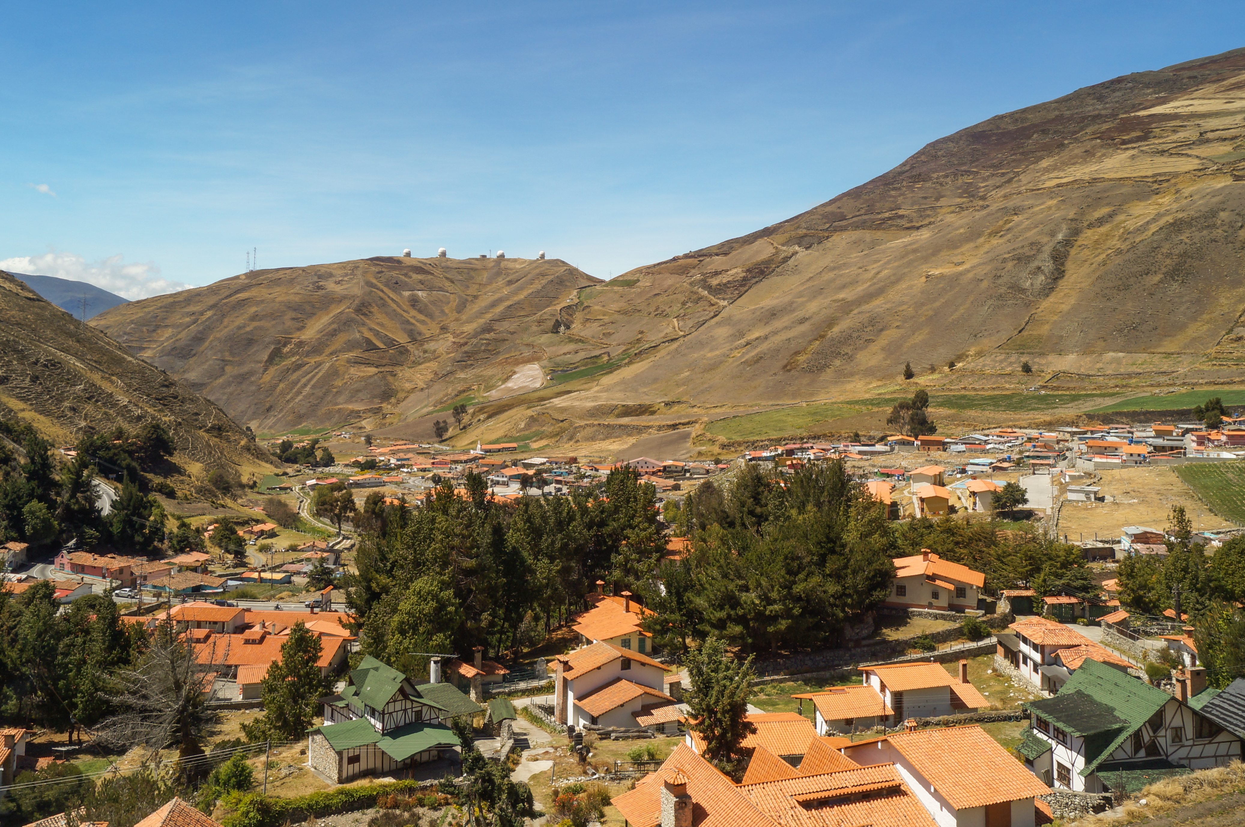 Apartaderos es uno de los pueblos más hermosos del páramo merideño lleno de historia, tradiciones y leyendas. También es conocido como San Isidro de Apartaderos. Se encuentra a 58 kilómetro de la ciudad de Mérida en la carretera trasandina a una altura de 3.505 m.s.n.m y goza de un clima promedio de 6 °C. Es un caserío antiguo con reliquias de un pasado indígena y colonial. Aún se aprecian amplias casonas de tapia y tejados con patios internos. Debe su nombre a los antiguos caminos que en la colonia se dirigían a Trujillo y a Barinas.En la colina se puede se encuentran las cúpulas del Observatorio Astronómico de La Fundación Centro de Investigaciones de Astronomía "Francisco J. Duarte" .(CIDA. Mérida. Venezuela.